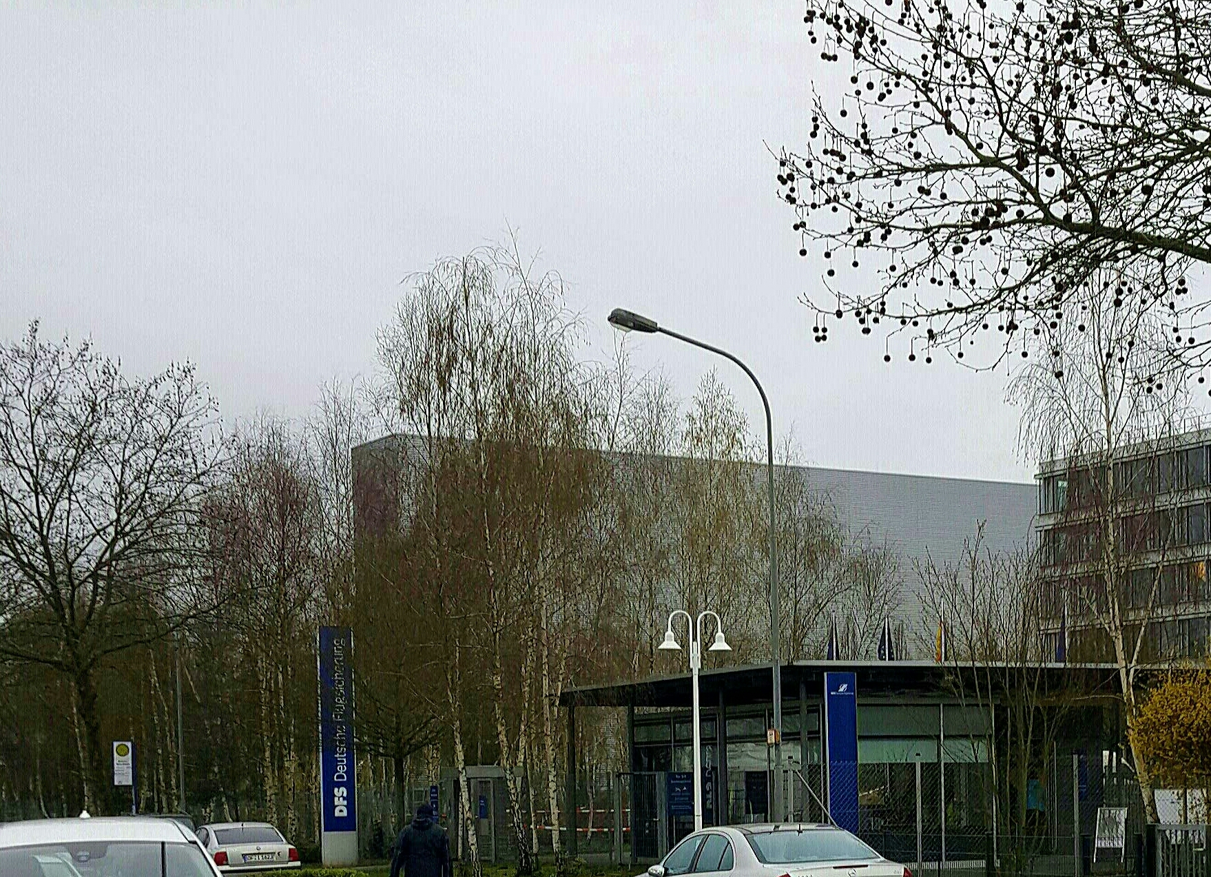 DFS headquarters in Langen, near Frankfurt am Main